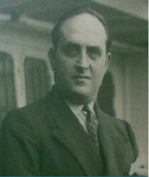 Giovanni Inghilleri